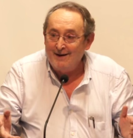 Intervención de Carlos Forcadell en el congreso sobre "Historiografía, marxismo y compromiso político en España. Del franquismo a la actualidad" desarrollado en Madrid el 27 y 28 de noviembre de 2014.